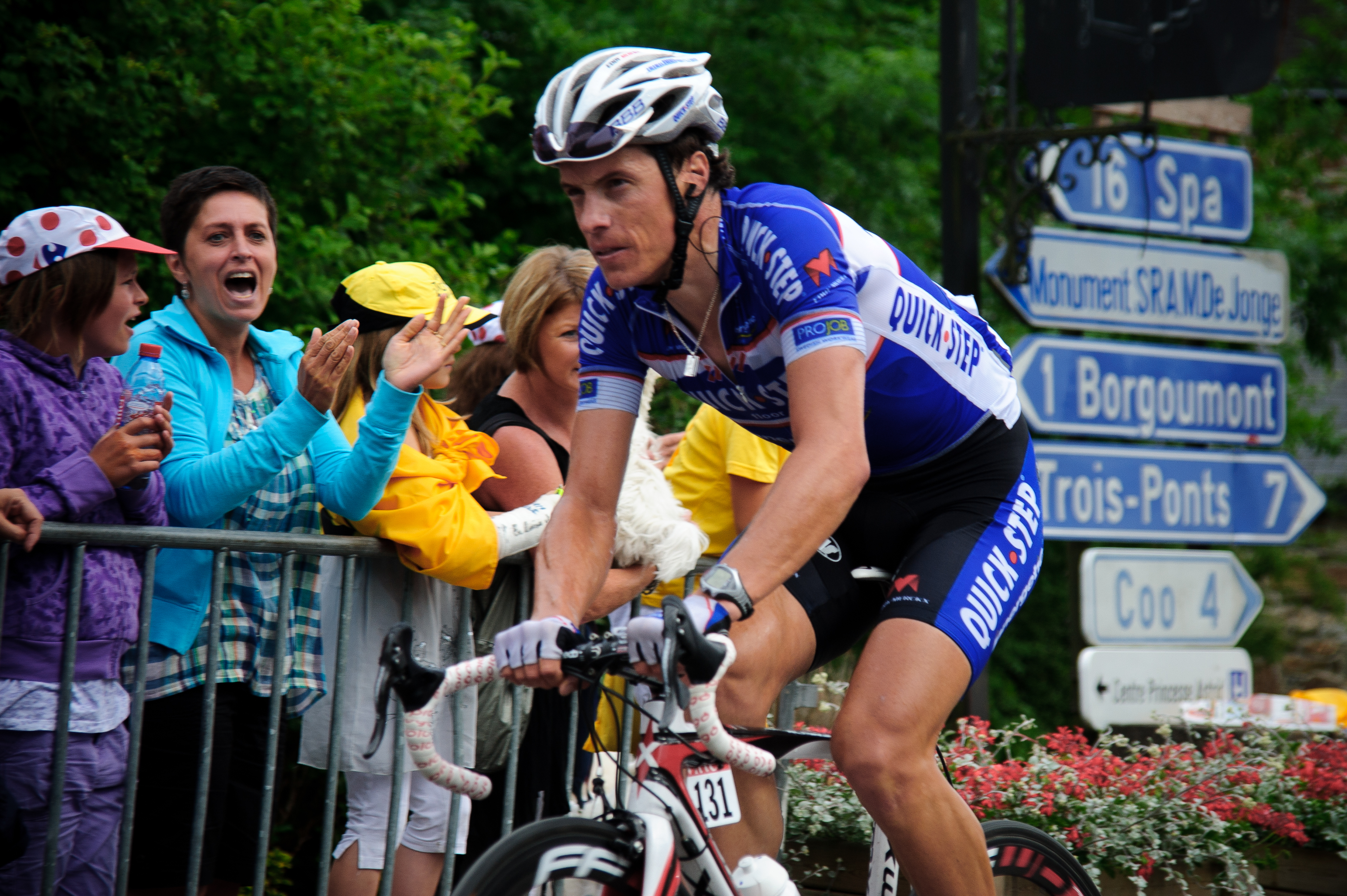 Sylvain Chavanel lors de la 2eme étape (qu'il remporta) du Tour de France 2010 reliant Bruxelles à Spa.